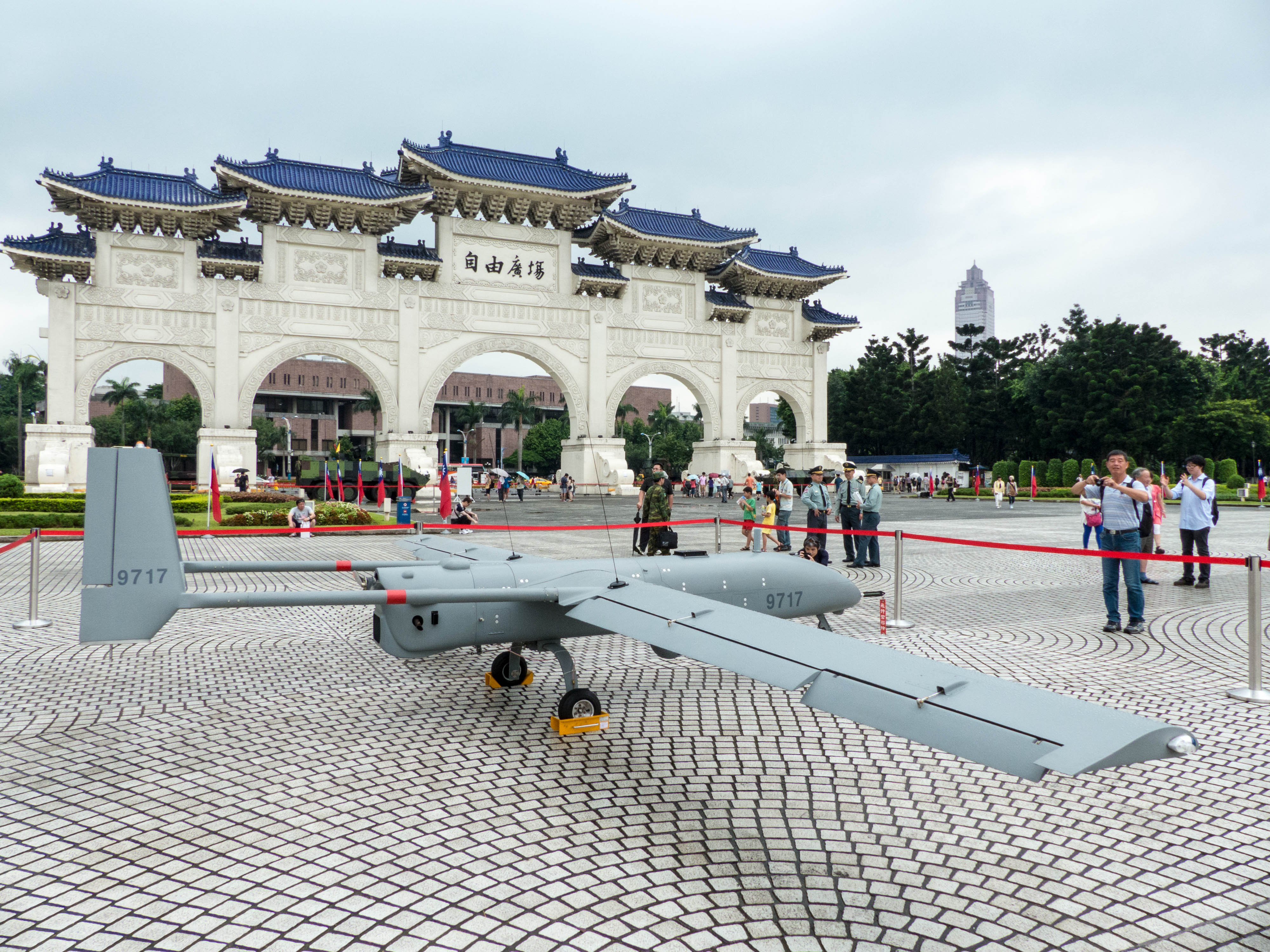 國家戲劇院前展示的銳鳶無人機右後方。